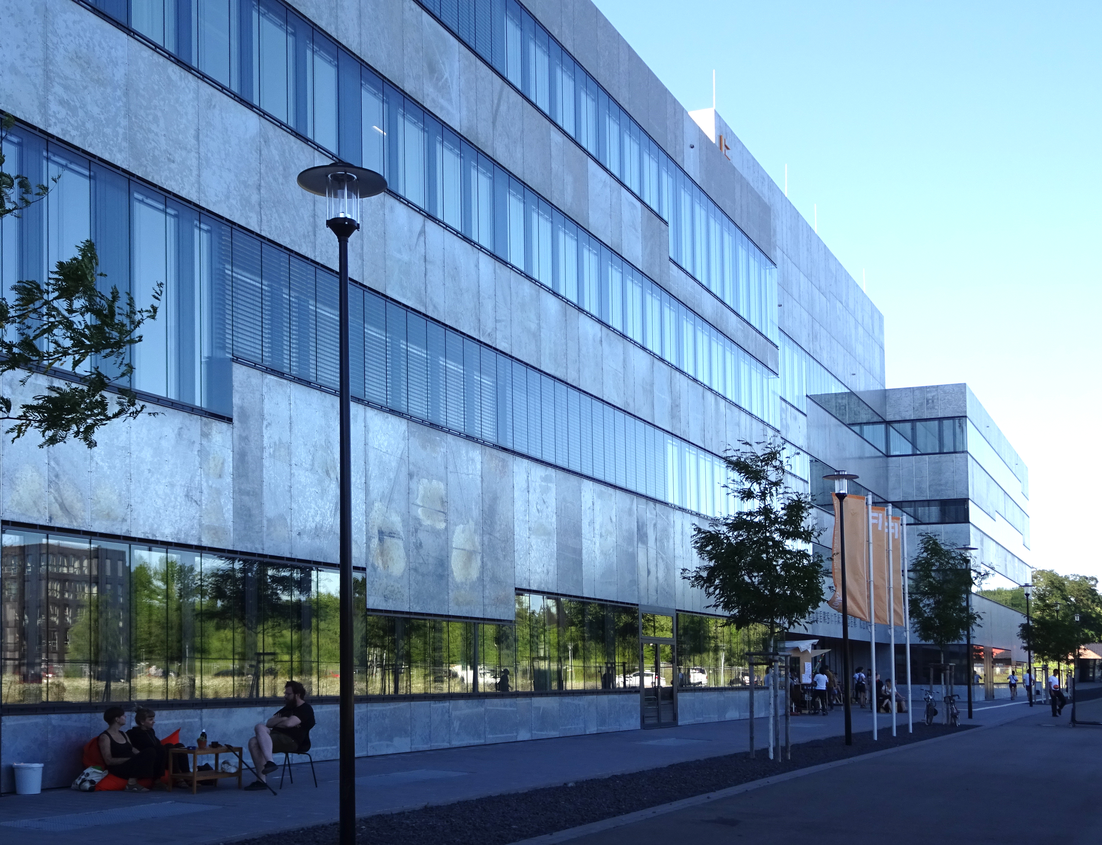 Gebäude Folkwang Universität der Künste, Fachbereich 4, in Essen-Stoppenberg